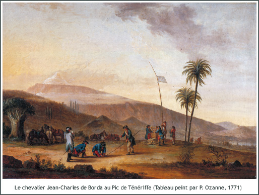 Jean-Charles de Borda mesurant le Pic de Ténériffe - peinture de Pierre Ozanne, 1771 - Musée de Borda